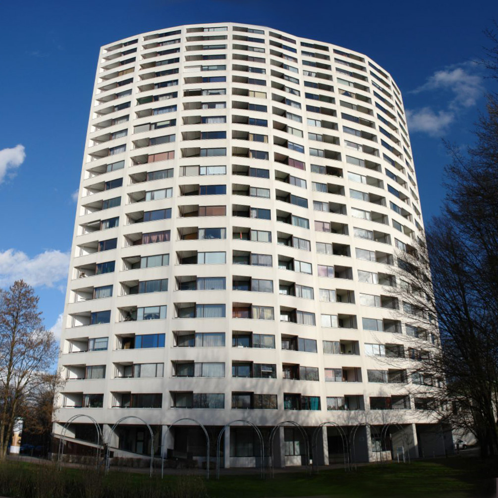 Aalto-Hochhaus in Bremen Vahr, Westseite. Erbaut 1959-61